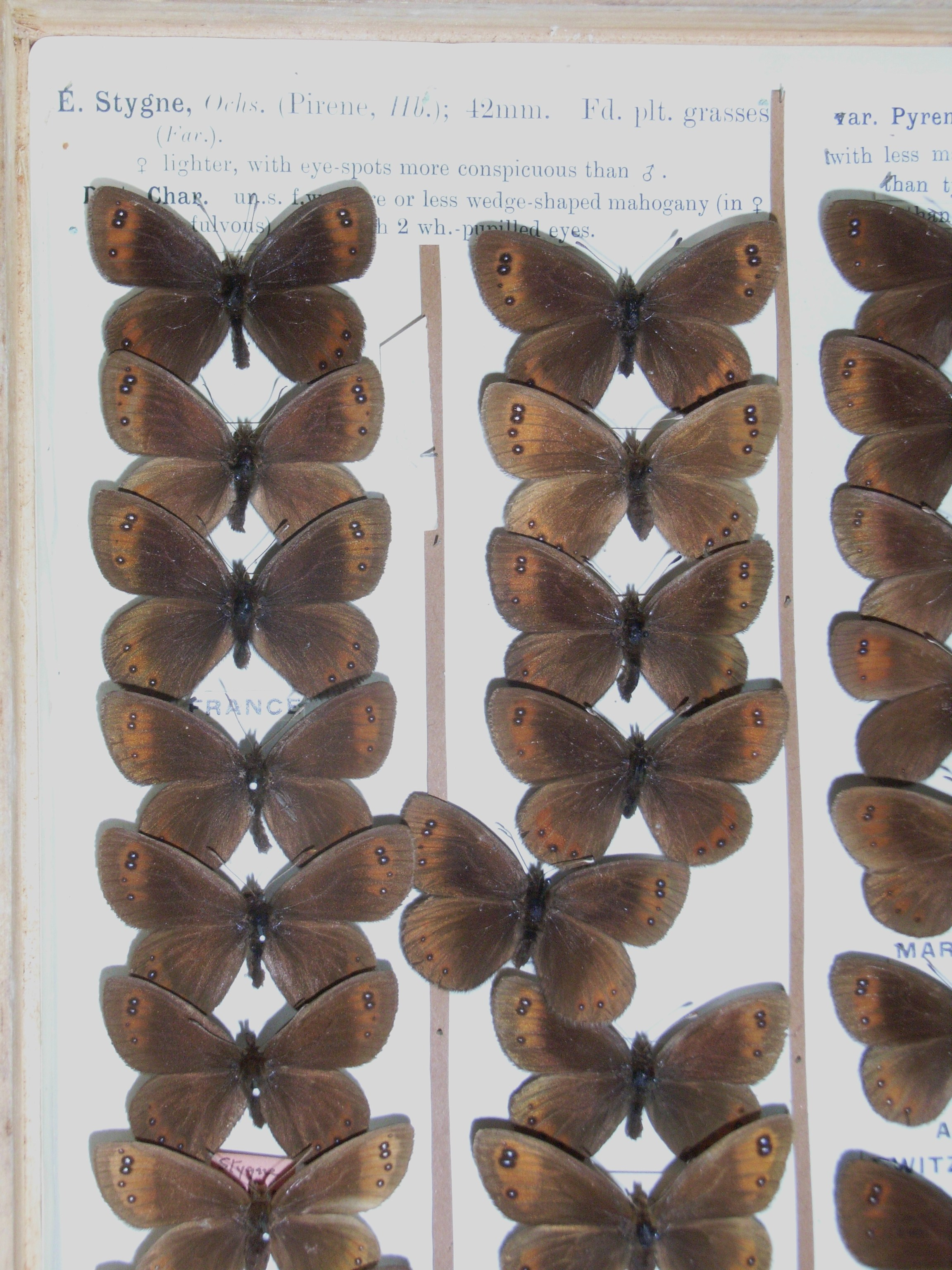 Erebia meolans (Prunner, 1798) (syn. E. stygne Ochsenheimer, 1807)